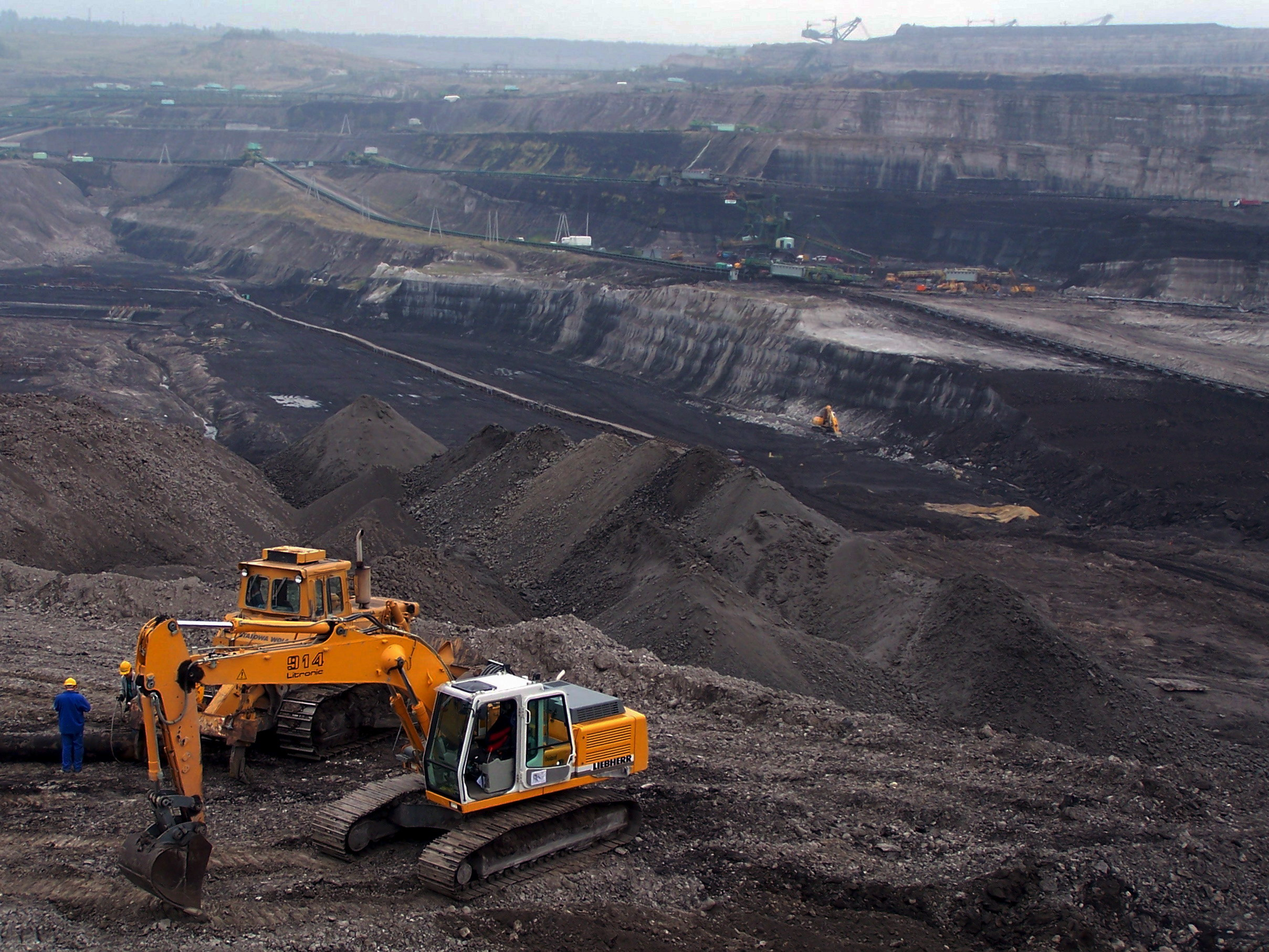 Lignite mine "Turów", Poland